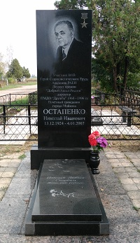 Остапенко Н. И. Надгробный памятник. Аллея Славы Майкоп.